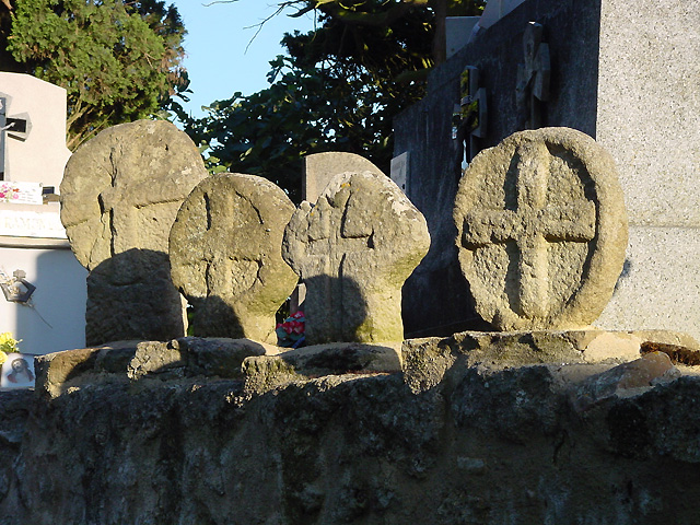 Stêles discoïdales